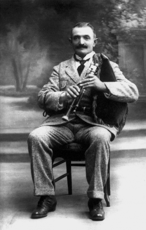 Antoine Bouscatel joueur de cabrette auvergnat.